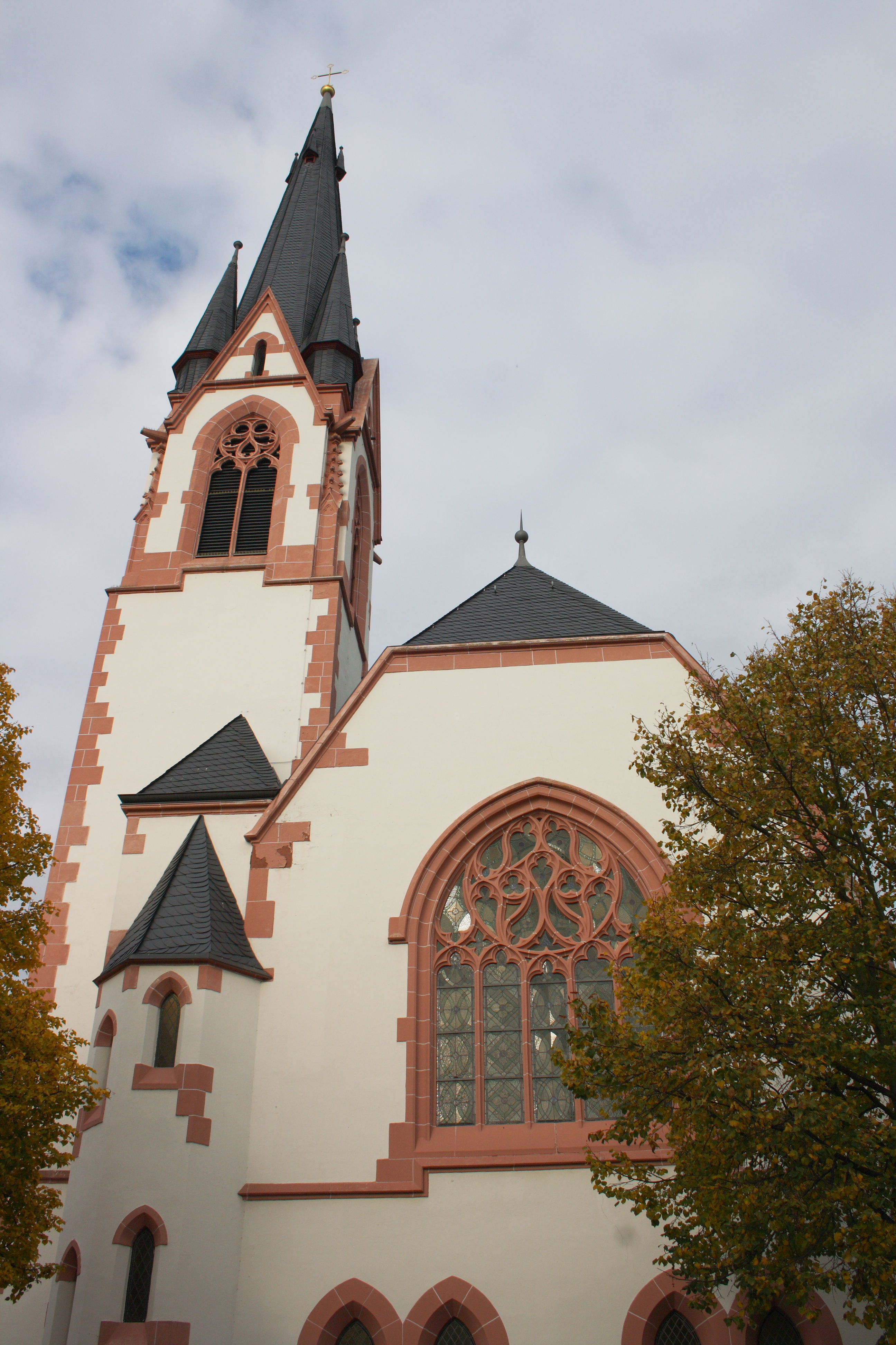 Evangelische Kirche in Engers, einem Stadtteil von Neuwied